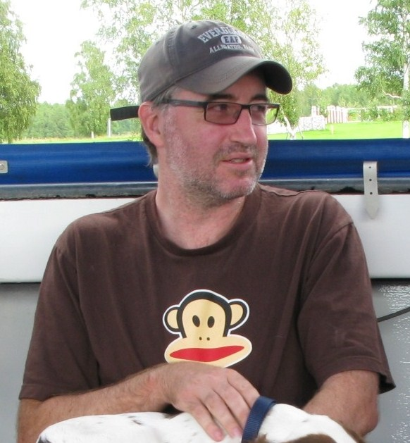 Fredrik Lundberg i augusti 2010.